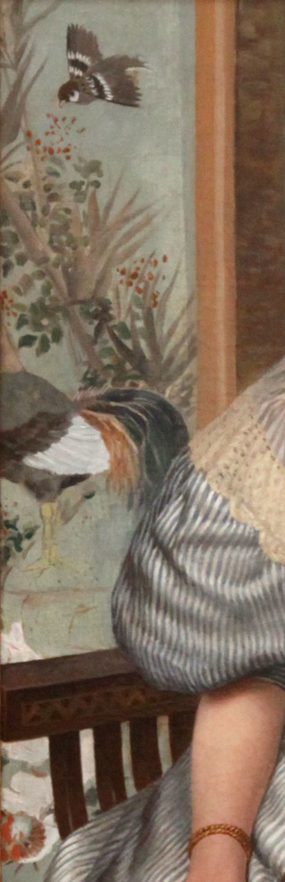 Museu Nacional de Belas Artes - Rio de Janeiro - Rodolfo Amoedo - Más Notícias - 1895 - óleo sobre tela - 100 x 74 cm - Assinada: R Amoêdo Rio 895 - compra: 1895